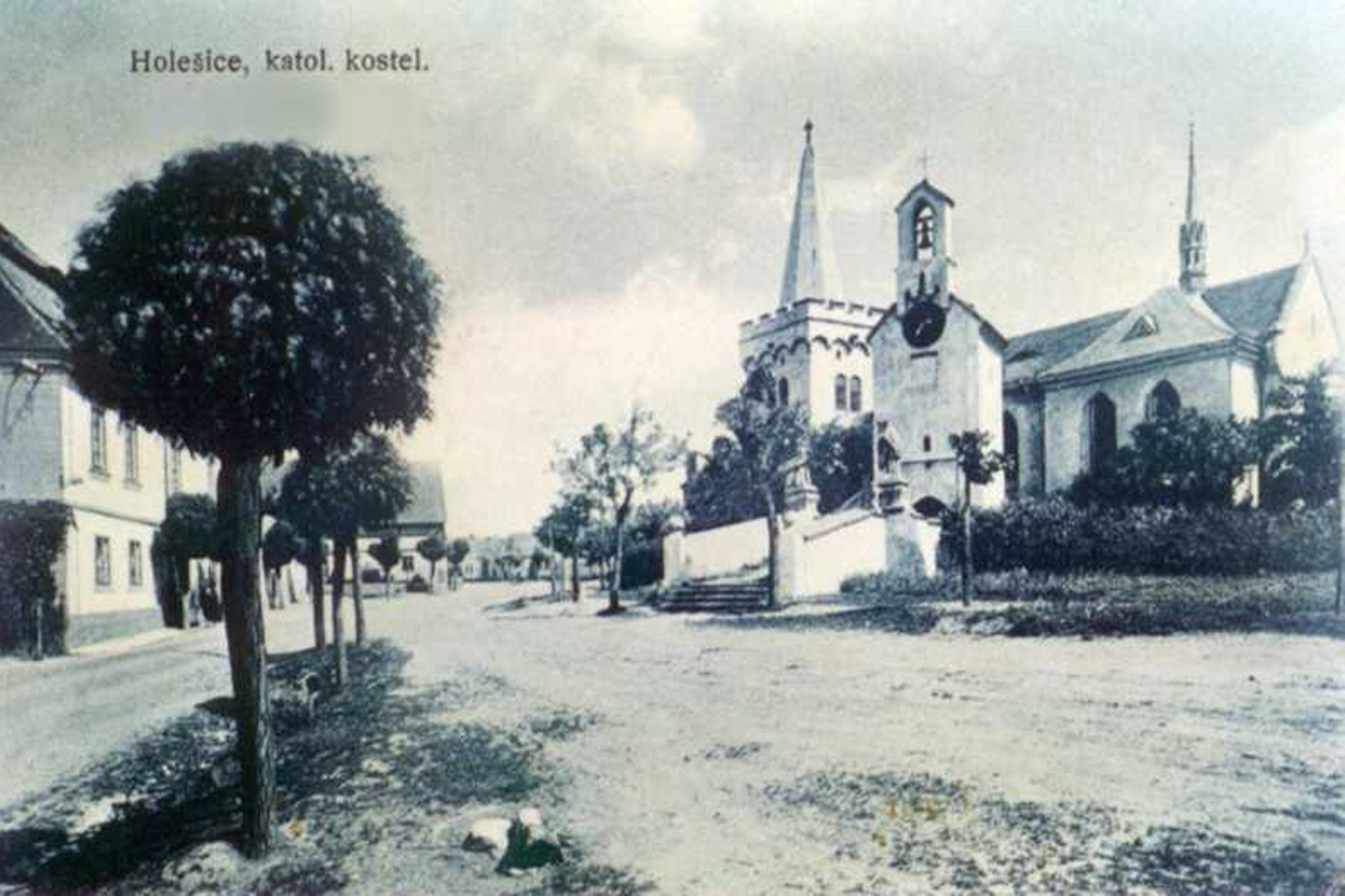 Dorf Holešice (Holschitz) bei Most (Brüx)